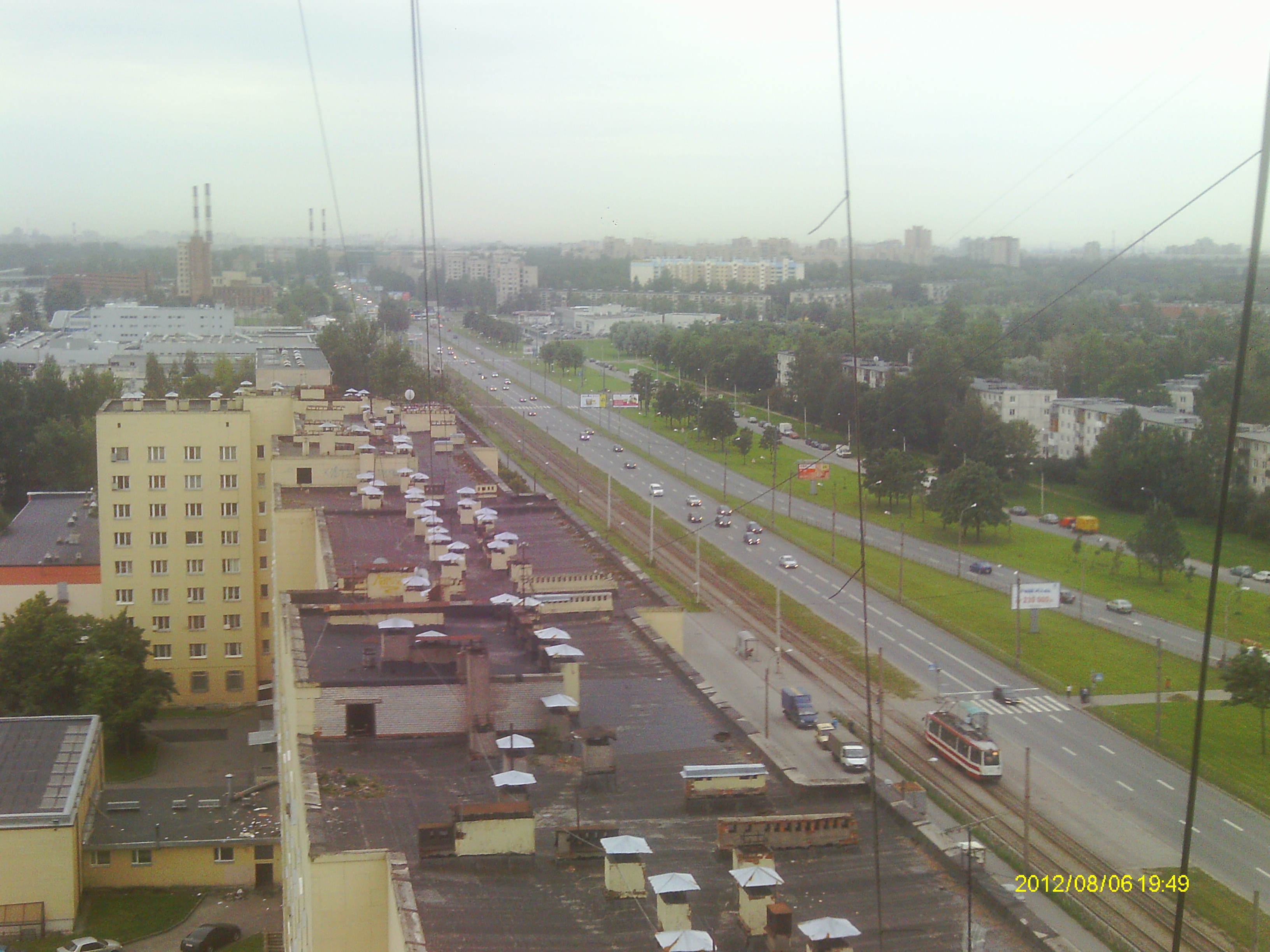 Вид на юг с 16-го этажа 1-го корпуса Общаги-37 (2012)